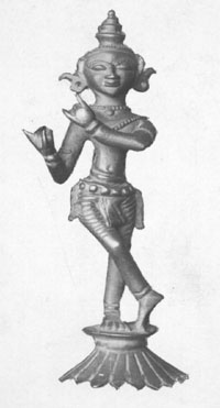 Anoniem. Krishna met fluit (Krsna Venugopala). Brons. Verblijfplaats onbekend. Met toestemming van Katinka Hesselink (